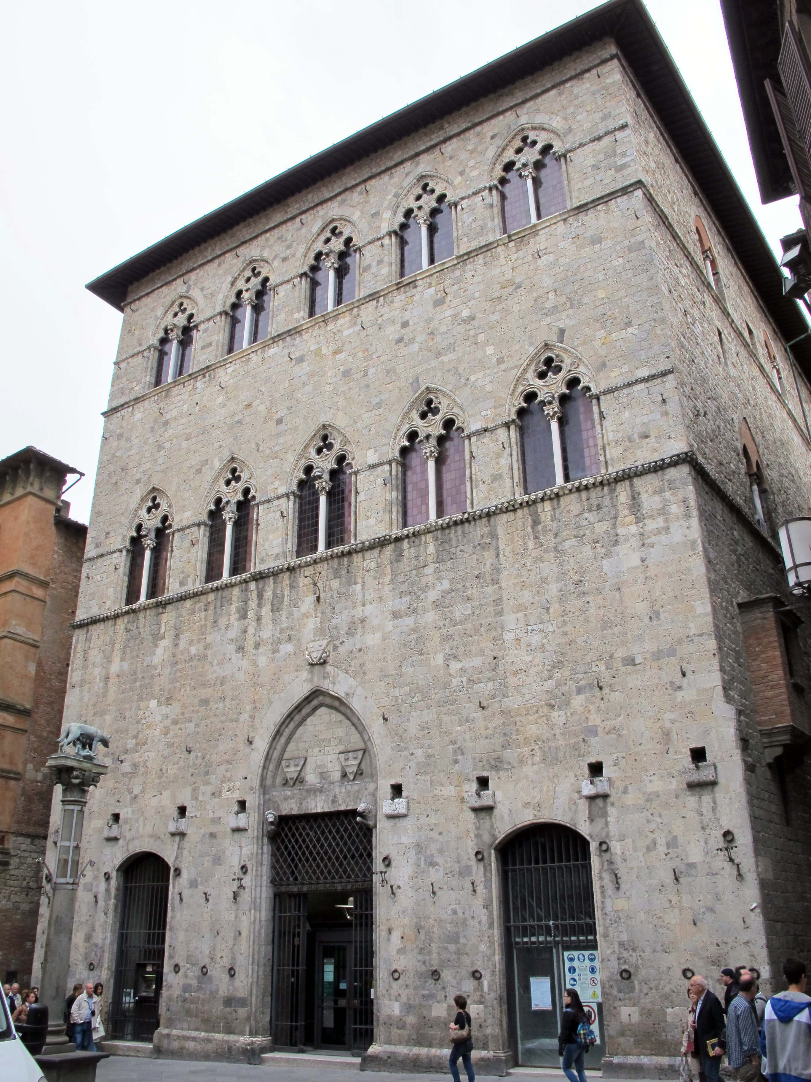 Banchi di Sotto e dintorni, Siena